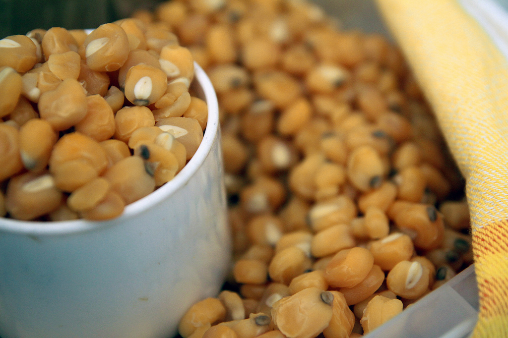 La preparación de este producto tarda cerca de 9 horas y parte con la cocción de los granos de maíz en abundante agua con cenizas (lejía) para que bote el hollejo. Después se lava y ya limpio parte una segunda cocción, hasta que está listo para servir.